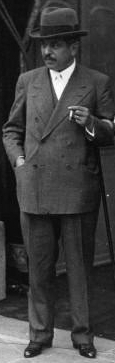 Conseil des ministres en 1934 (second gouvernement Gaston Doumergue). De gauche à droite : Henri Queuille, Pierre Laval, Louis Barthou.